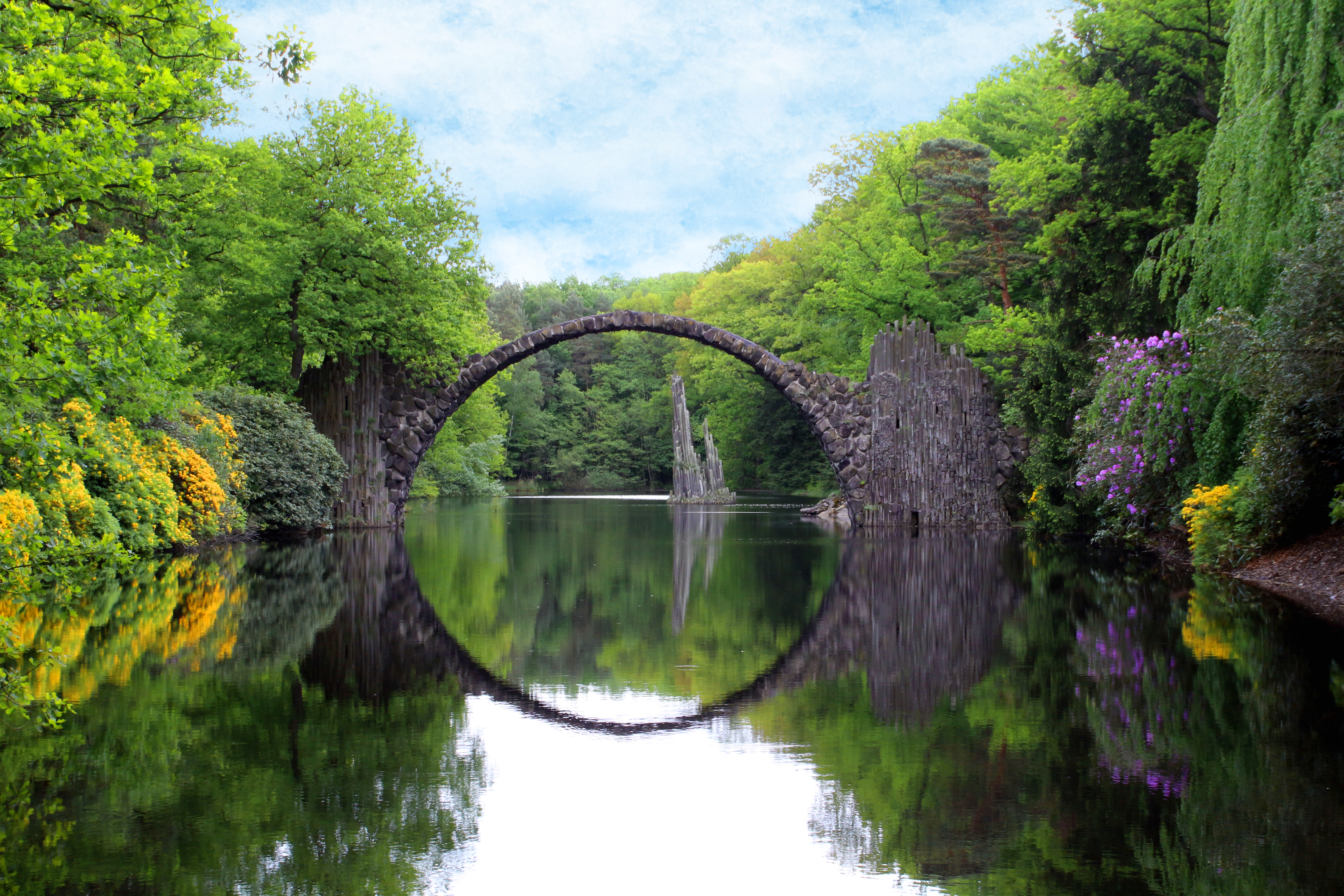 Rakotzbrücke in Kromlau Hornjoserbsce: Rakocowy móst w Kromoli